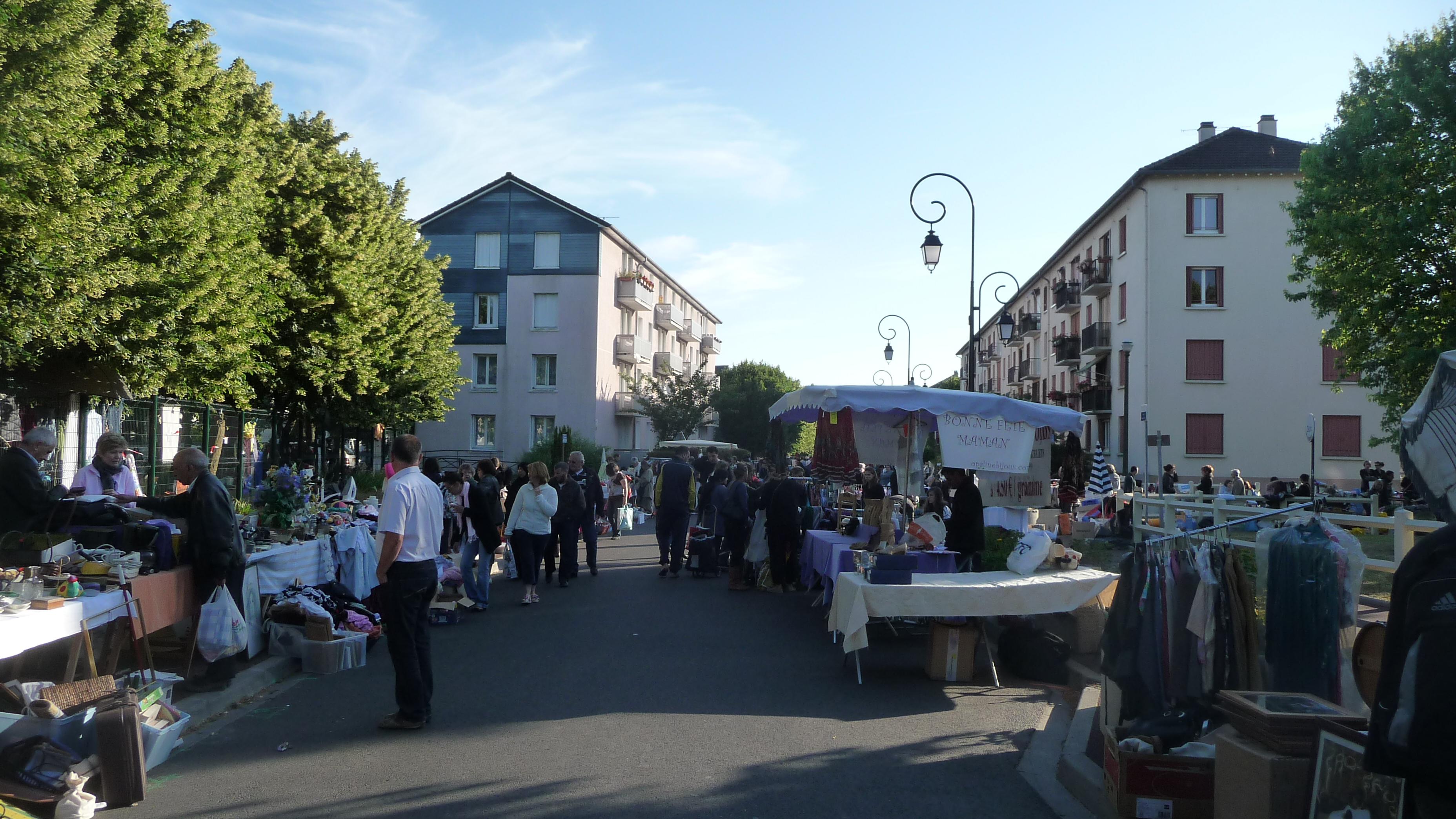 Brocante sur le boulevard Pasteur au Mesnil-le-Roi (Yvelines - France)